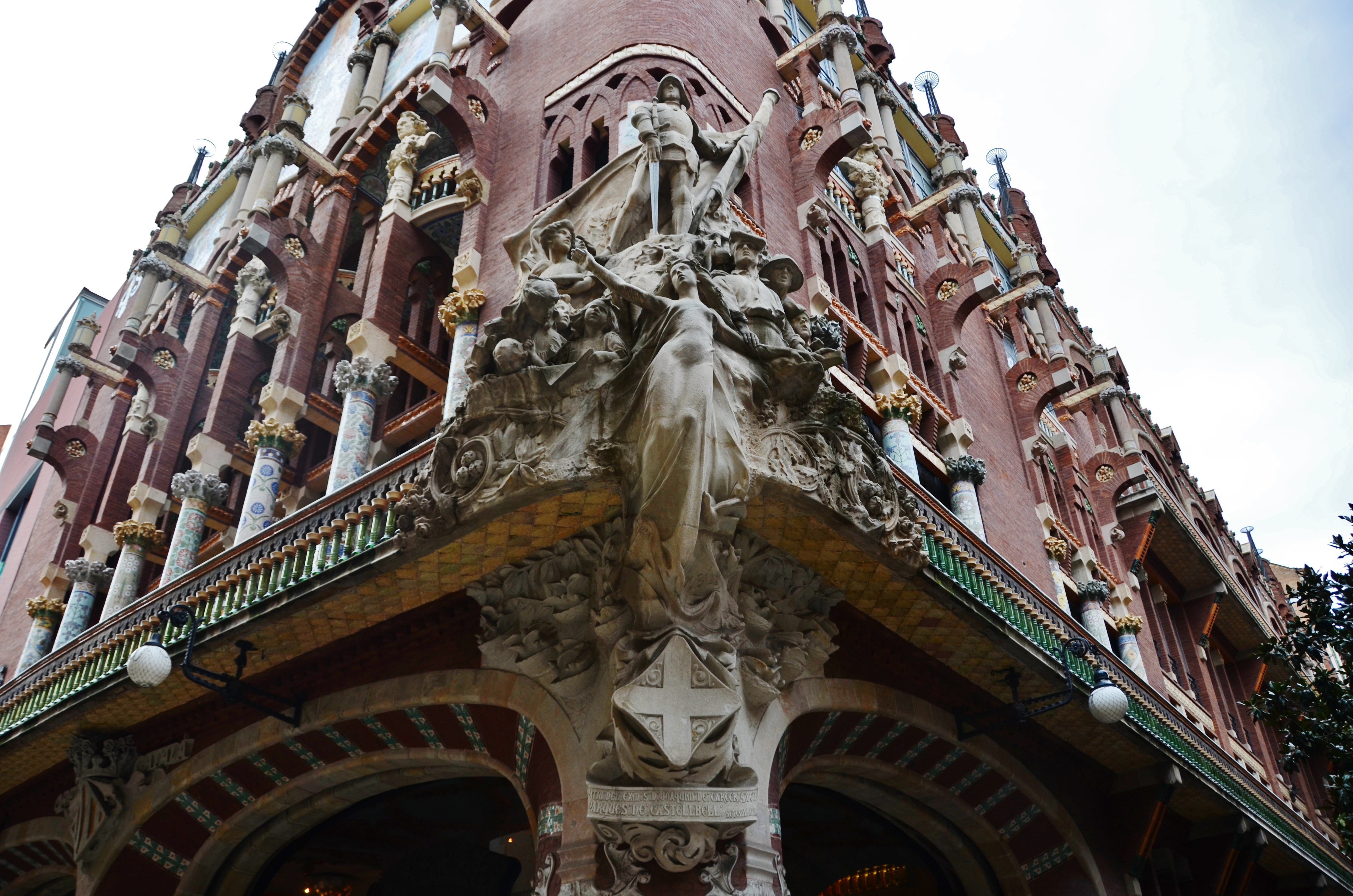 Palau de la Música Catalana,Sant Pere, Santa Caterina i la Ribera, Barcelona